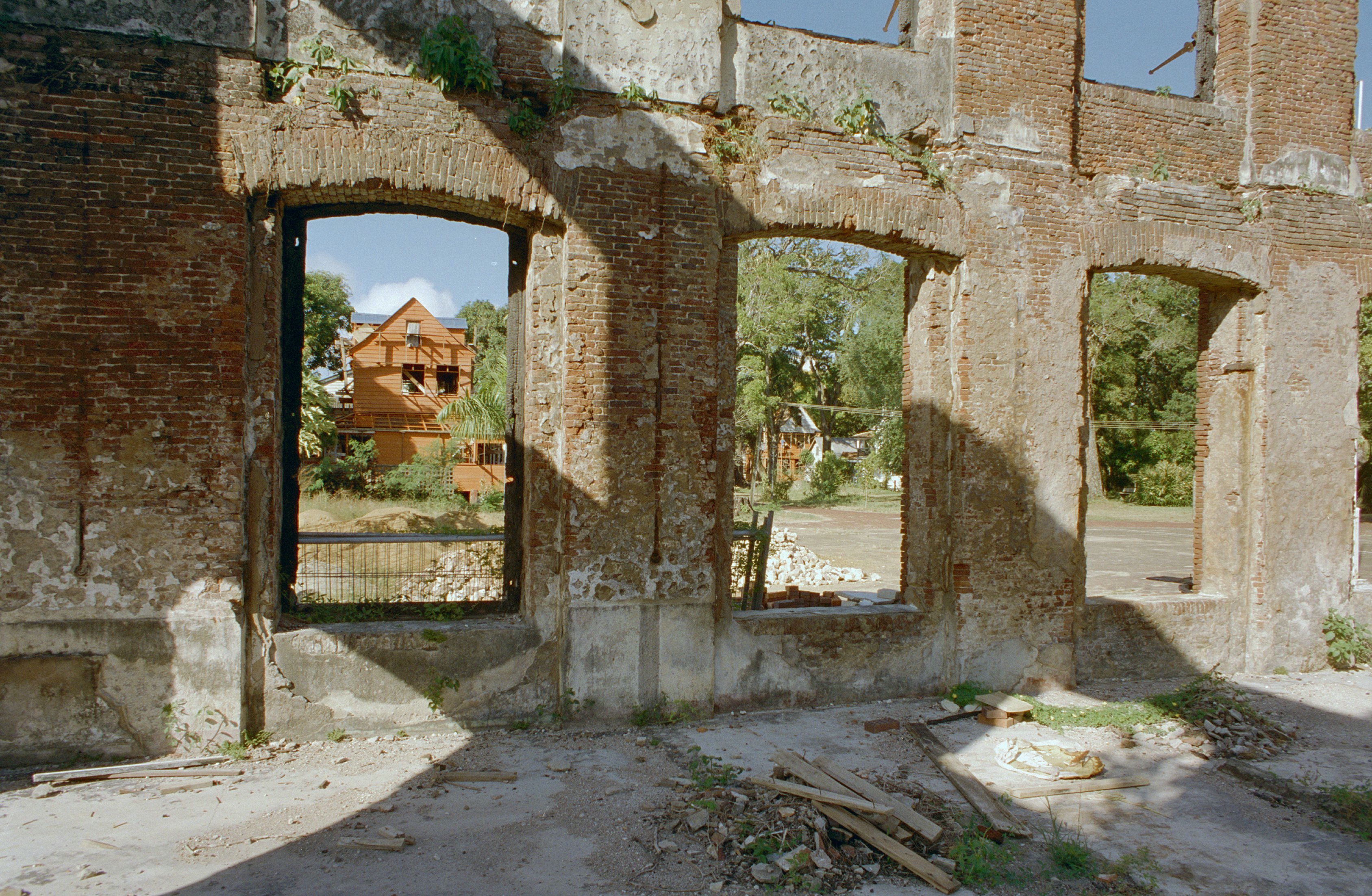 Fort Zeelandia: Zicht op linker zijgevel commandantswoning op het fortcomplex, tijdens restauratie, gezien door venster van ruïne gebouw 1790 (opmerking: Suriname Reis Loek Tangel)